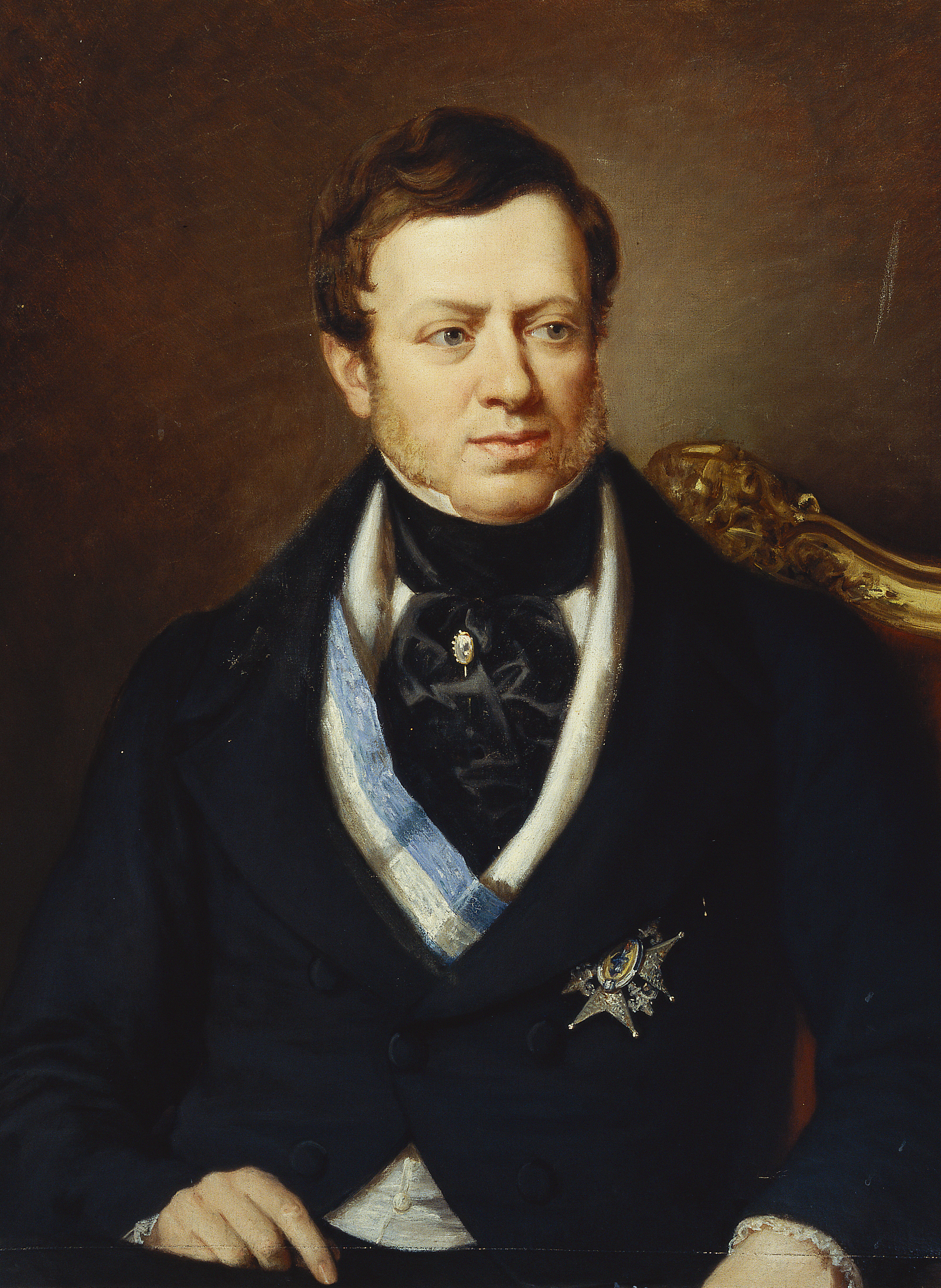 Retrato del aristócrata y politico español José María Queipo de Llano (1786-1843), que fue el séptimo conde de Toreno, Grande de España y Presidente del Consejo de Ministros de España.